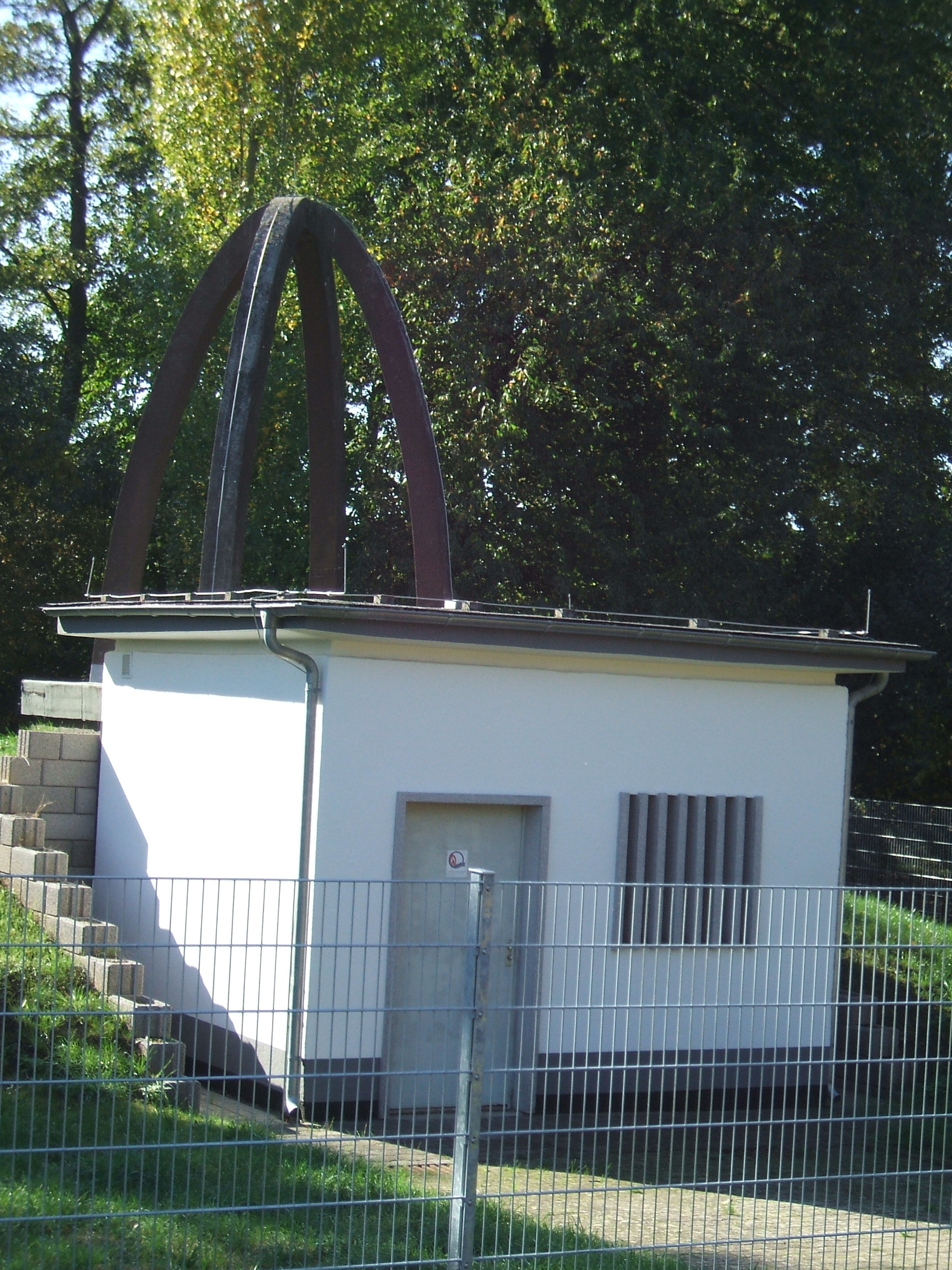 Anlage zur Trinkwassergewinnung im Gewann "Die Schmelz" nahe dem Leihgraben und der historischen Schmelzmühle